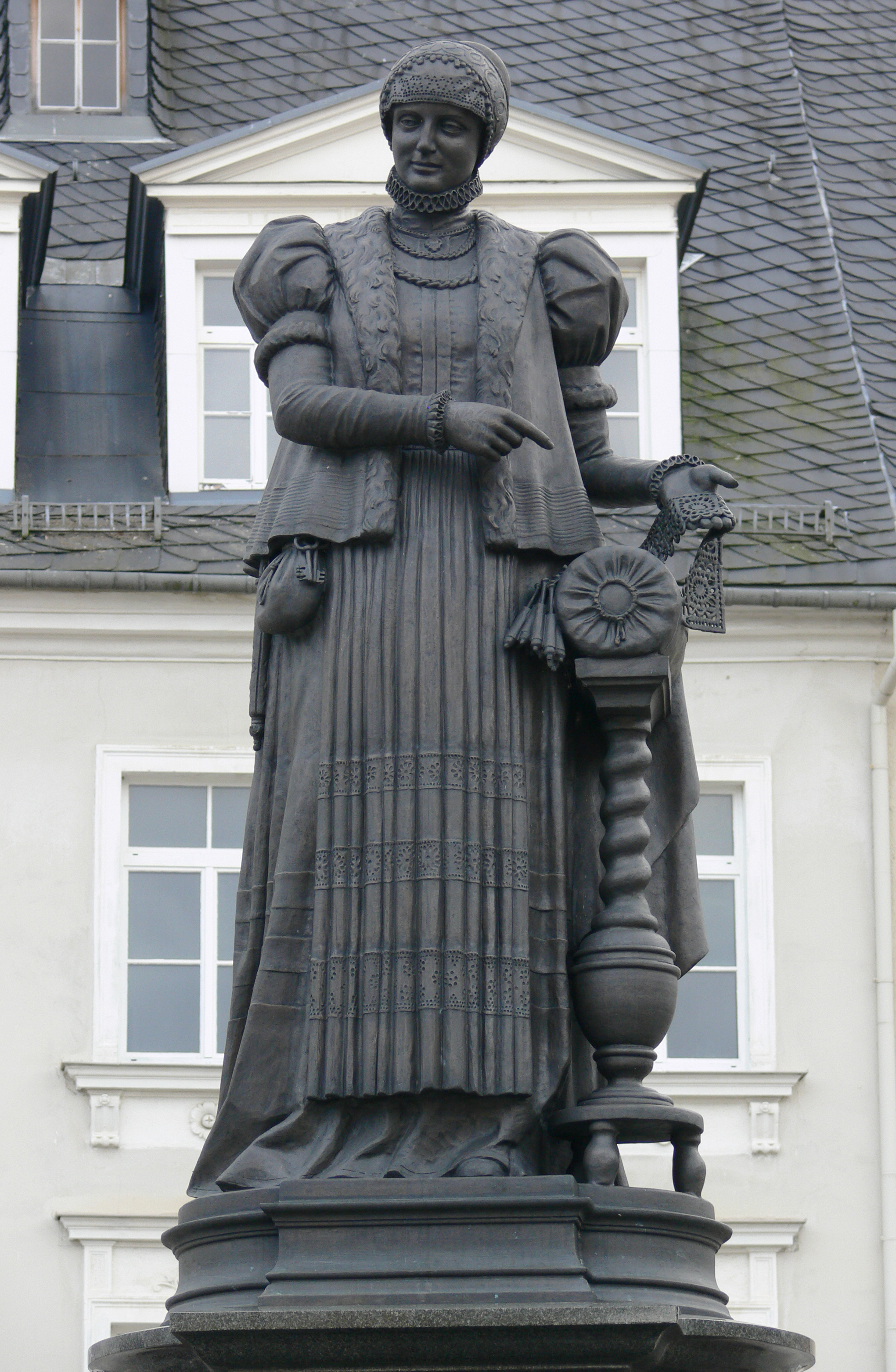 Annaberg-Buchholz, Barbara-Uthmann-Brunnen am Markt in Annaberg